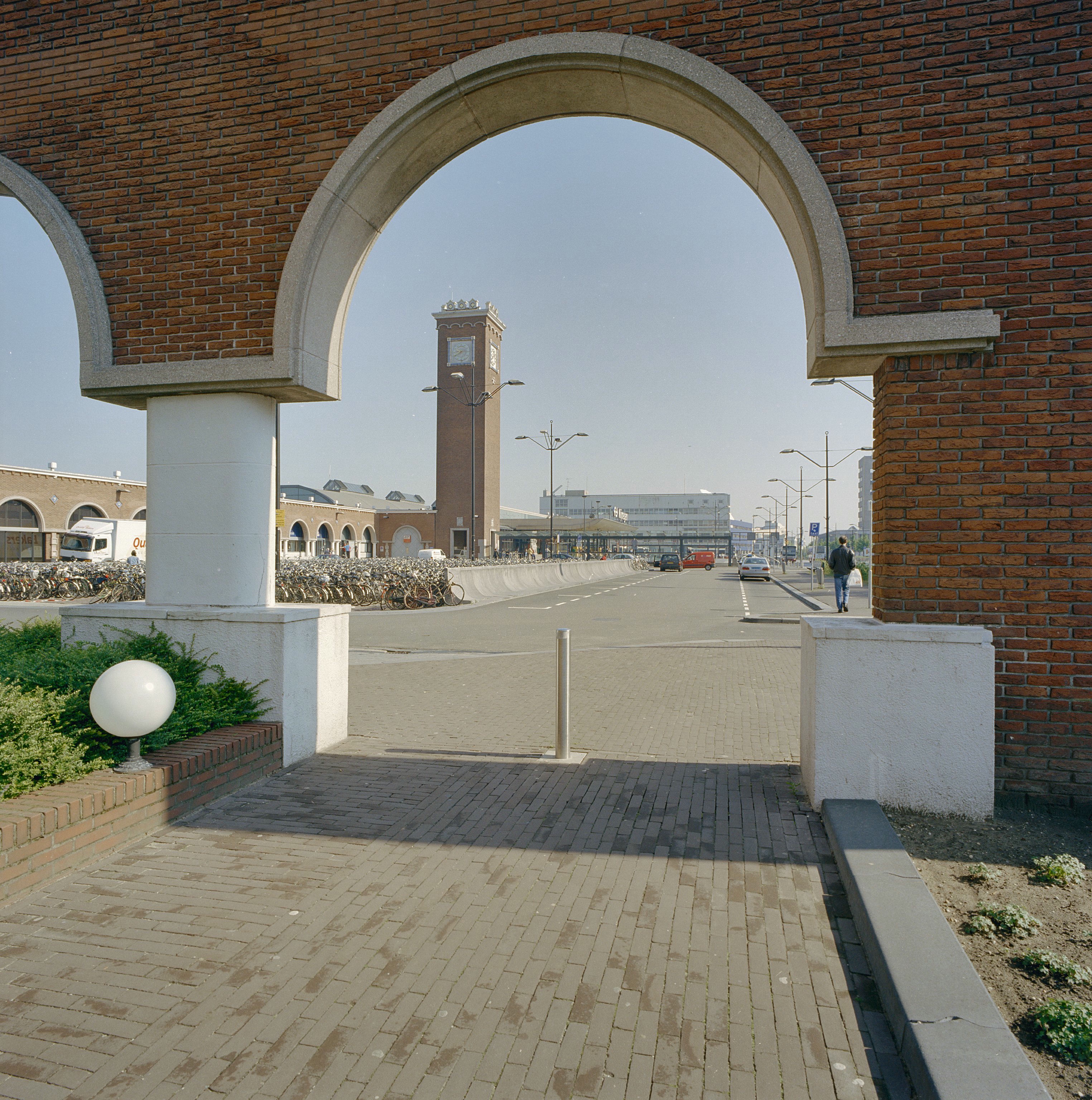 Station: Overzicht. Gezicht door de Arcade richting het Mercure Hotel